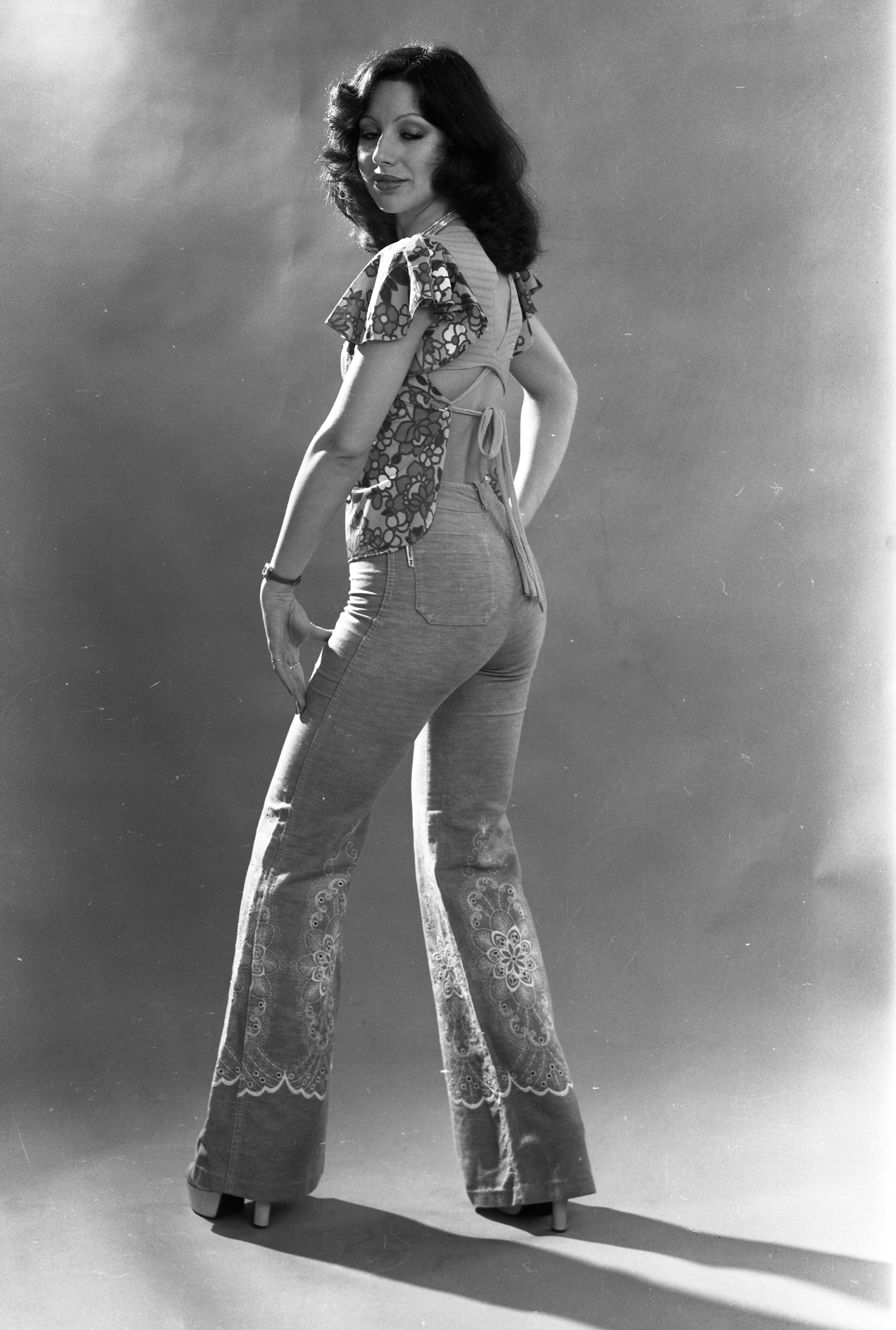 Szűcs Judit énekesnő. Location: Hungary Tags: beat era, singer, fashion, portrait, celebrity, flared trousers Title: Szűcs Judit énekesnő.